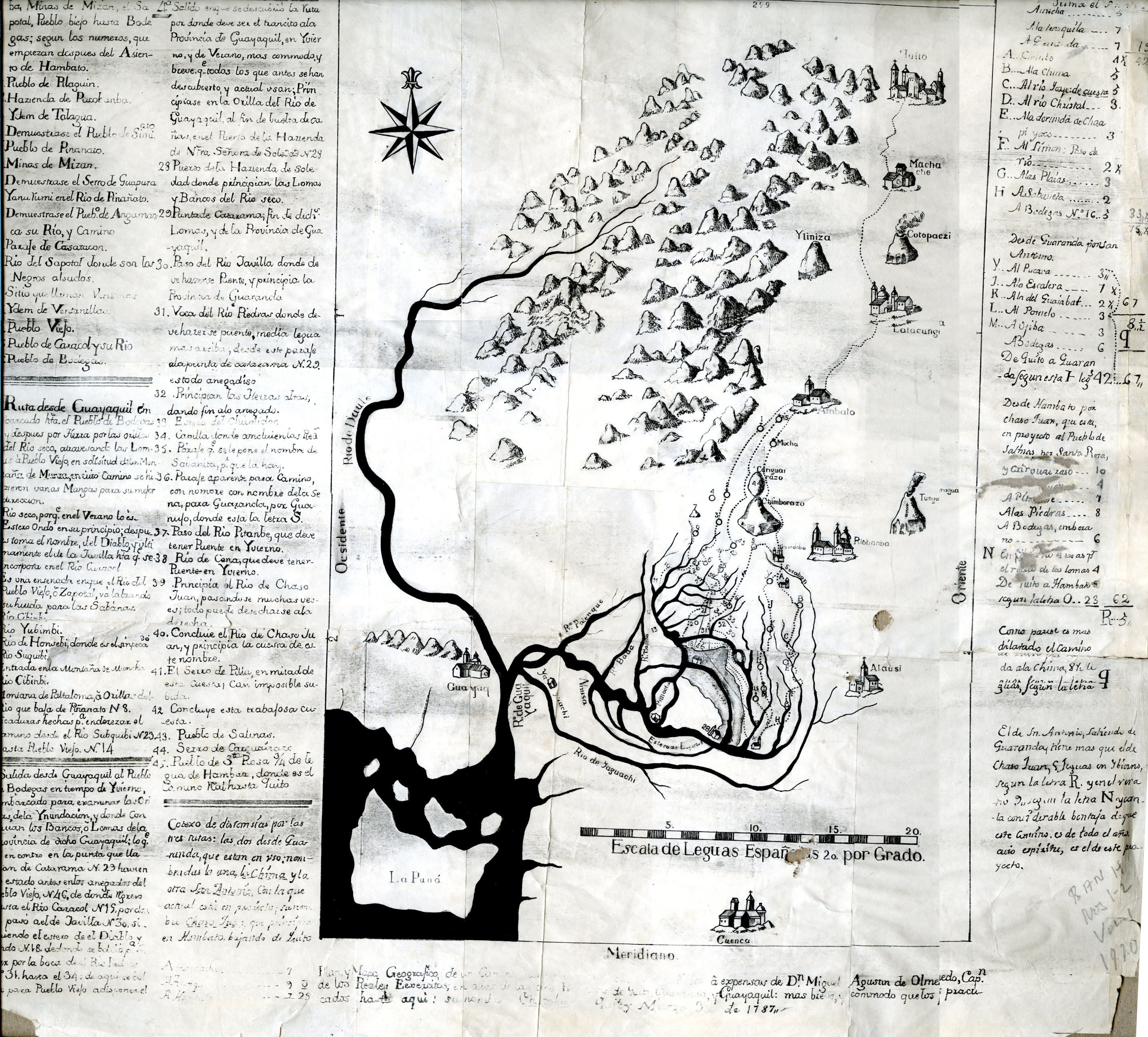 Dibujo del Camino Real desde la Ciudad de Guayaquil hasta la de Quito, llamada también Ruta Colonial de Caminos Vecinales donde se articulaba la costa y la sierra de la Audiencia de Quito. En el invierno (mediados Diciembre- mediados de Mayo) era casi imposible acudirlo por lo que que se buscaban caminos alternos y en el verano (Abril - términos de Noviembre) se aprovechaba la estabilidad de la tierra para aprovechar el trajin de toda clase de abastos y el proceso de las diligencias burócráticas. El facisimil electrónico del original data en la fecha del 3 de Marzo de 1787. Diapositiva de Consulta y acceso público cuya información fue investigada de un libro y/o ejemplar de revisión custodiado en los Fondos Bibliográficos (Sección Siglo XVIII o Etapa Colonial) del Archivo Histórico del Guayas; Guayaquil, Ecuador.Consultado y compartido por el usuario J. Javier García A.